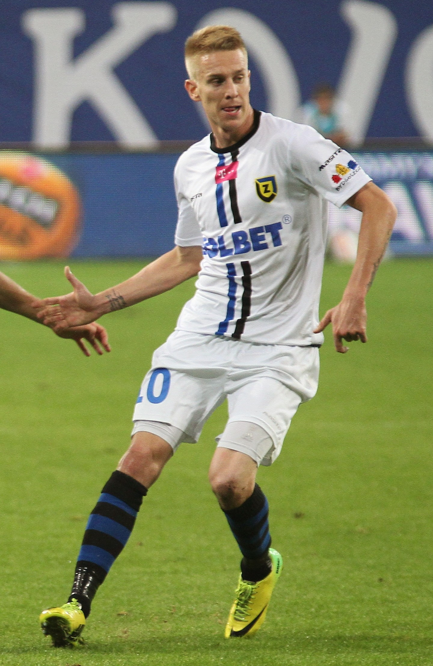 Jakub Wójcicki w barwach Zawiszy Bydgoszcz